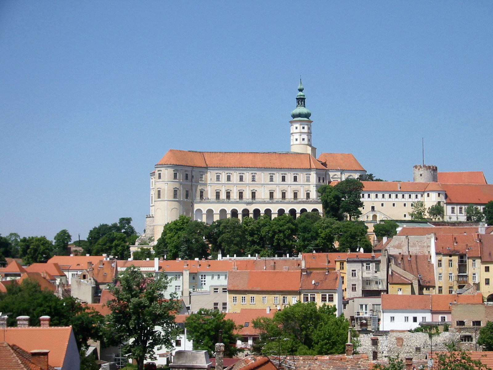 Schloss Mikulow